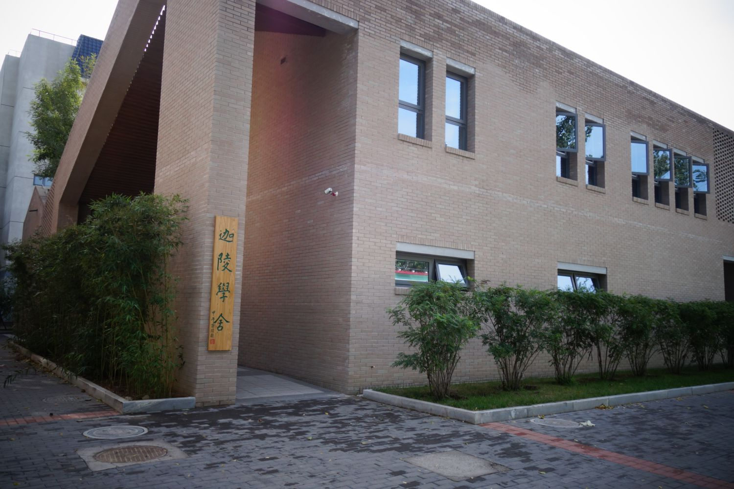 中文（中国大陆）: 南开大学迦陵学舍